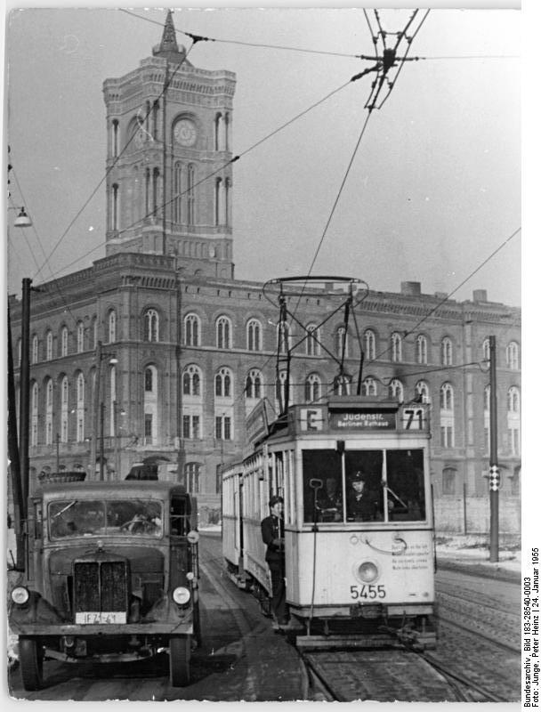 Berlin, Rotes Rathaus, Straßenbahn Zentralbild Junge 24.1.1955 Berlin. Rotes Rathaus, Südseite vom Molkenmarkt aus. Aufnahme Januar 1955